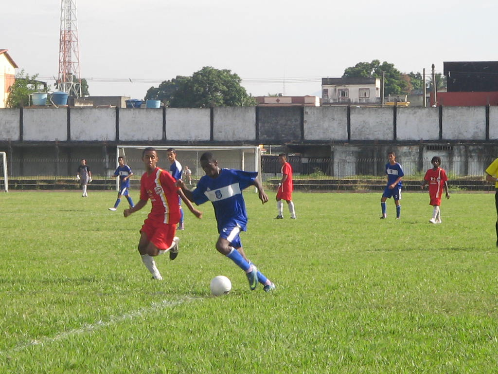 Atleta juvenil do Duquecaxiense em confronto com o Olaria, em 2009. Foto de Paulo Roberto Rodrigues.